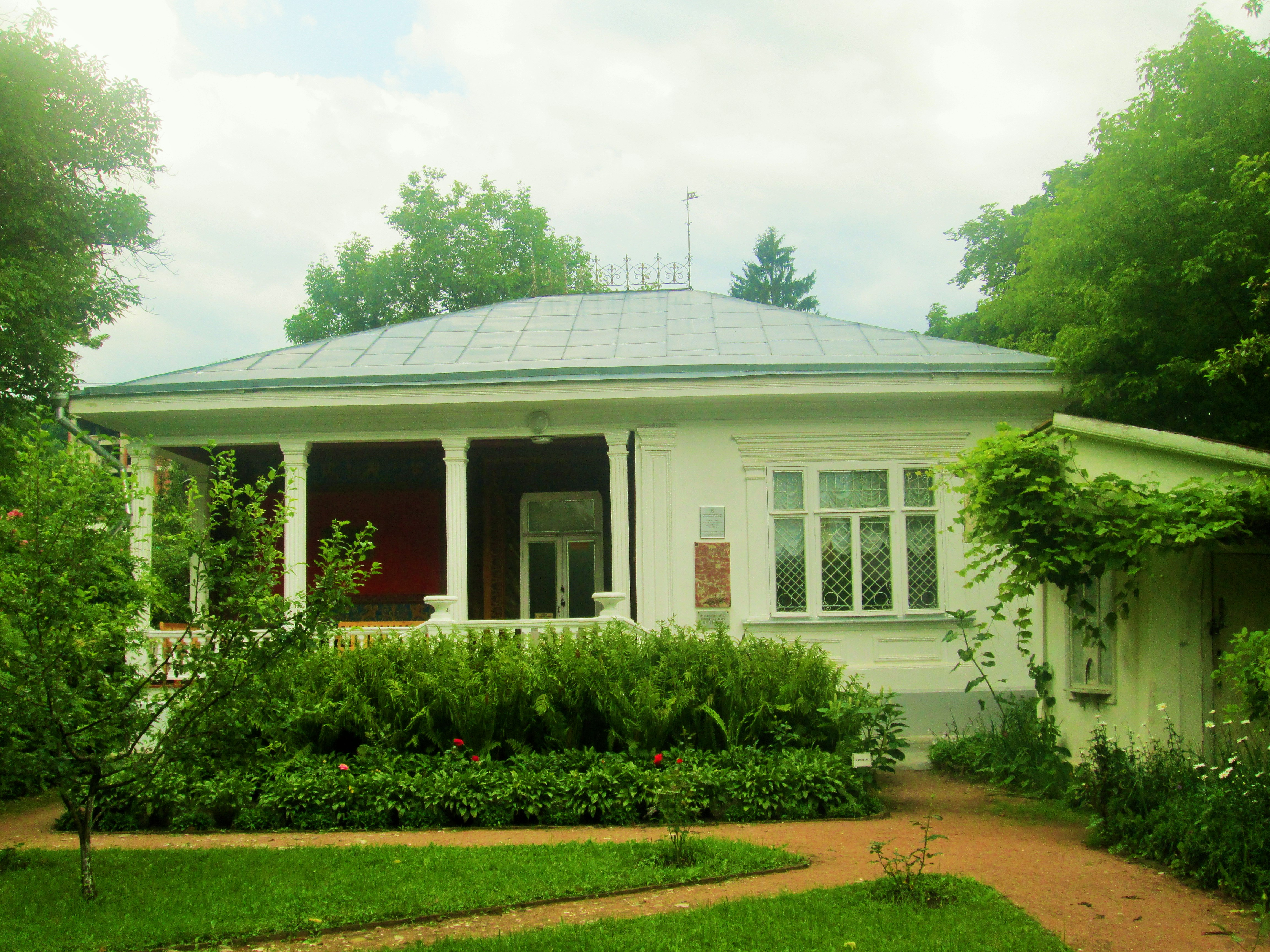 Усадьба художника Ярошенко Н.А., где он жил в 1892-1898 гг.: улица Ярошенко, 1, Кисловодск, Ставропольский край